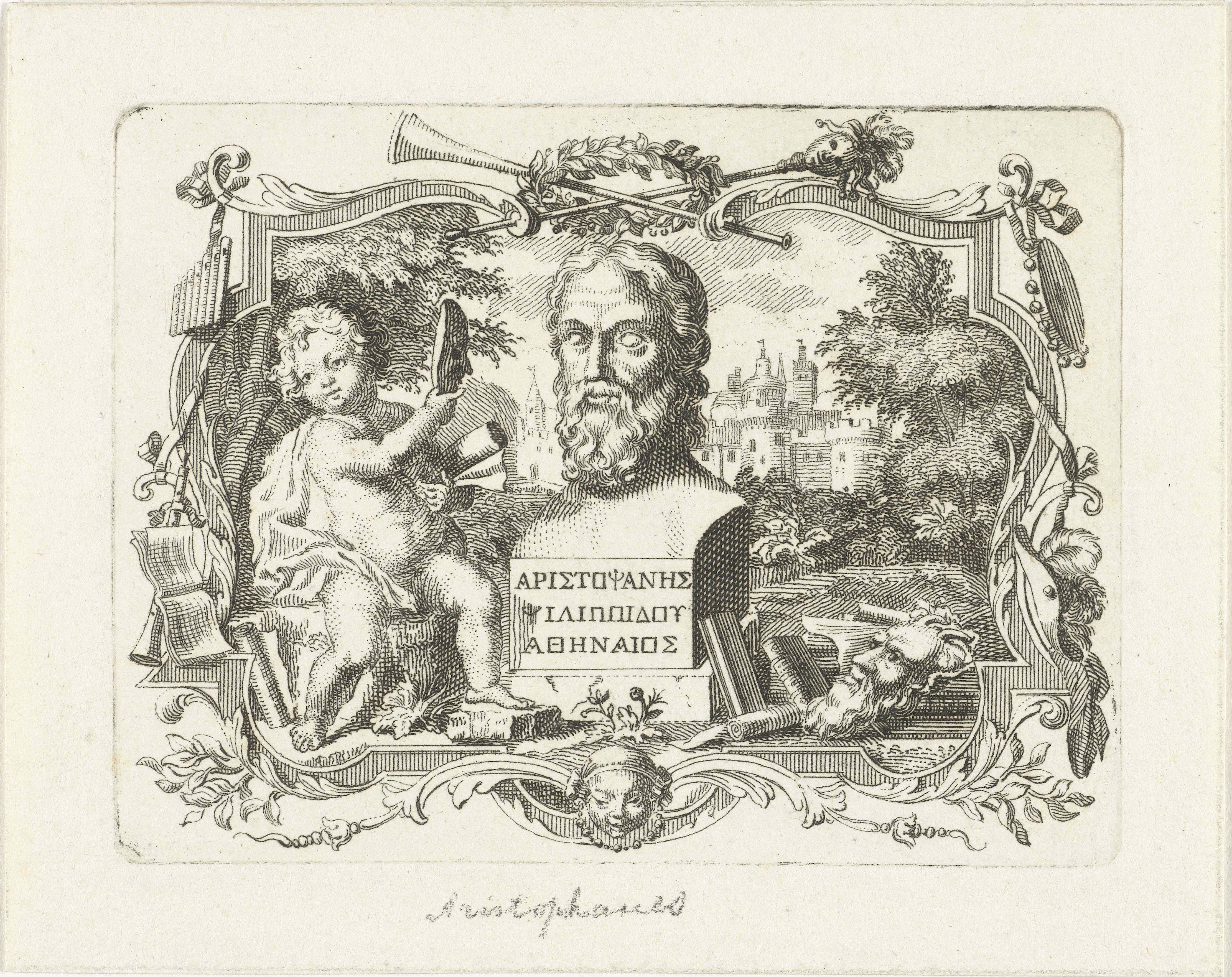 IdentificatieTitel(s): Buste van Aristophanes en putto met masker, in cartoucheObjecttype: prent Objectnummer: RP-P-BI-6971Catalogusreferentie: Collectie Rijksmuseum-1(2)Opmerking: niet genoemd in de literatuur, twee staten aanwezig in het RMAOpschriften / Merken: verzamelaarsmerk, verso, gestempeld: Lugt 240Omschrijving: Buste van Aristophanes en putto met masker in tuin van kasteel, in cartouche met muziekinstrumenten.VervaardigingVervaardiger: prentmaker: Abraham Delfosnaar eigen ontwerp van: Abraham DelfosPlaats vervaardiging: LeidenDatering: 1759Fysieke kenmerken: etsMateriaal: papier Techniek: etsenAfmetingen: plaatrand: h 72 mm × b 95 mmOnderwerpWat: portrait of a writercupids: 'amores', 'amoretti', 'putti'Wie: AristophanesVerwerving en rechtenVerwerving: overdracht van beheer 1816Copyright: Publiek domein